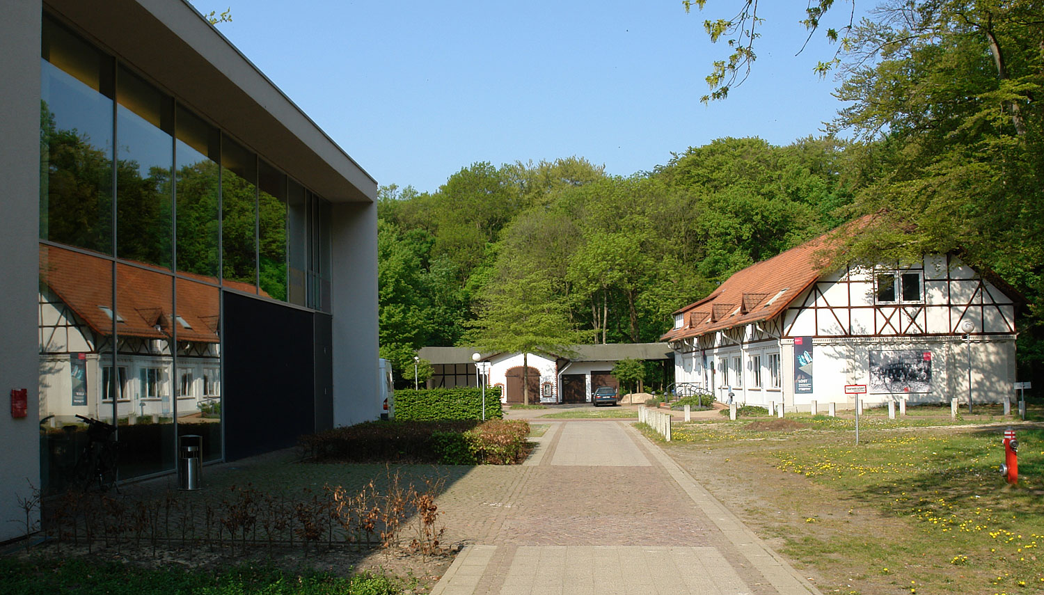 Klinikum Bremen-Ost, Haus im Park (links). Im Hintergrund Haus 41 & 43 (ehemals St.-Jürgen-Asyl) Krankenhausmuseum und Galerie im Park (rechts)